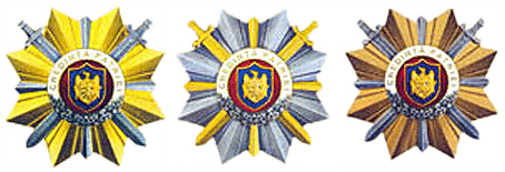 Ordinul „Credință Patriei”